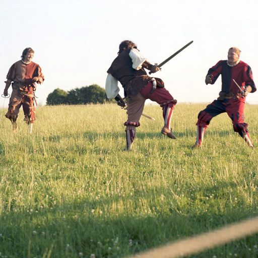 Historisches Fest